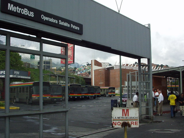 By Kinori, Caracas MetroBus ja: 撮影位置: ベネズエラ、ミランダ州、スクレ市。ペタレ駅近く、フランシスコデミランダ通りの北側歩道から。北東向き。 撮影日: 2004年8月16日。 撮影者: Kinori（投稿者と同じ） 立て札の「NO PARE」は「駐車禁止」。